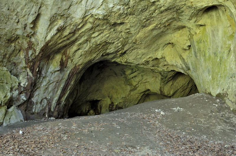 Deravá skala